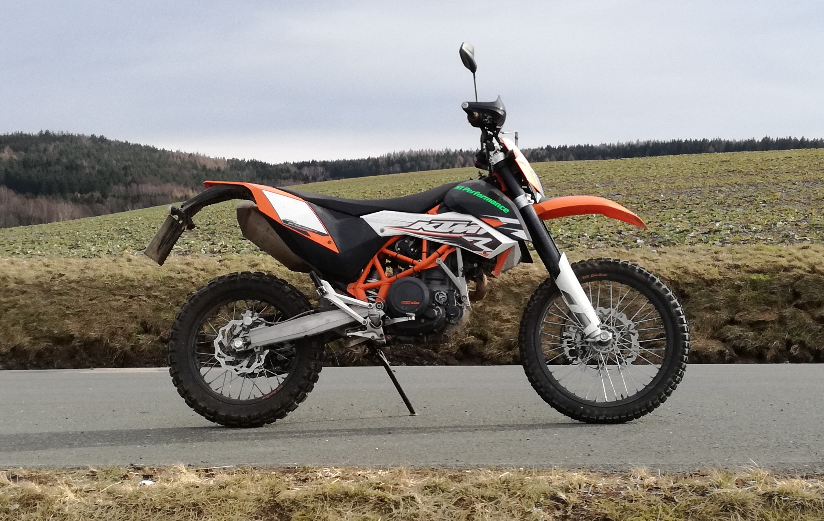 Seitenansicht Enduro R 2011 / Ort: Zwischen Langenbach und Weißbach Saxony